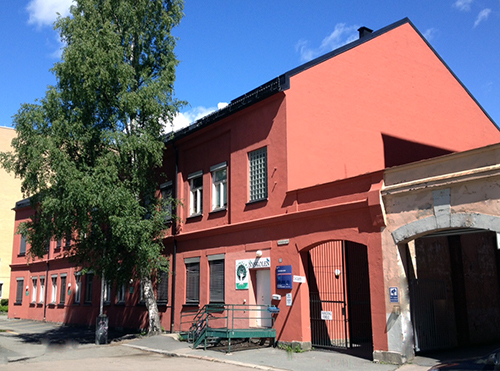 Nyskolen i Østerdalsgata i Oslo 2015, privatskole